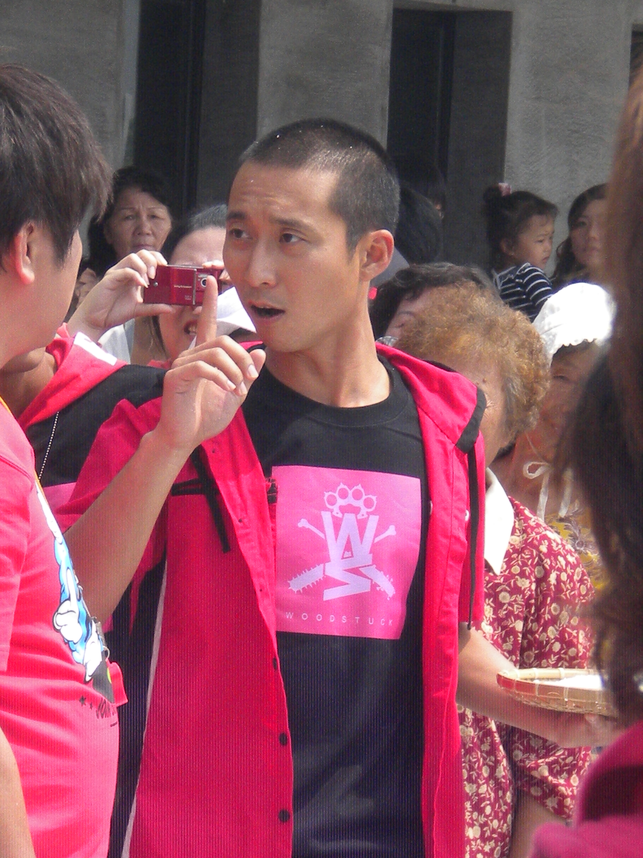 中文（台灣）: 浩角翔起的浩子